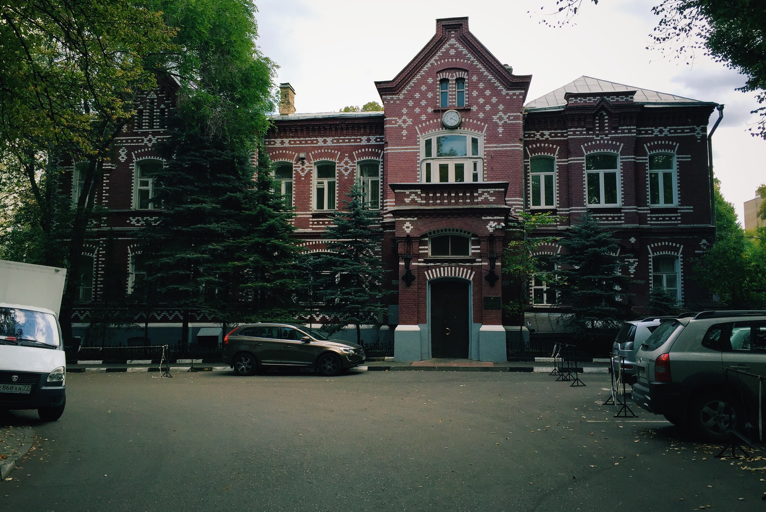 Новоалексеевская улица 16 строение 13. Здание конторы бывшей Алексеевской водокачки